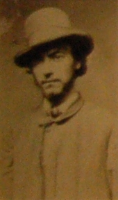 Charles Longuet, membre de la Commune de Paris (1871)